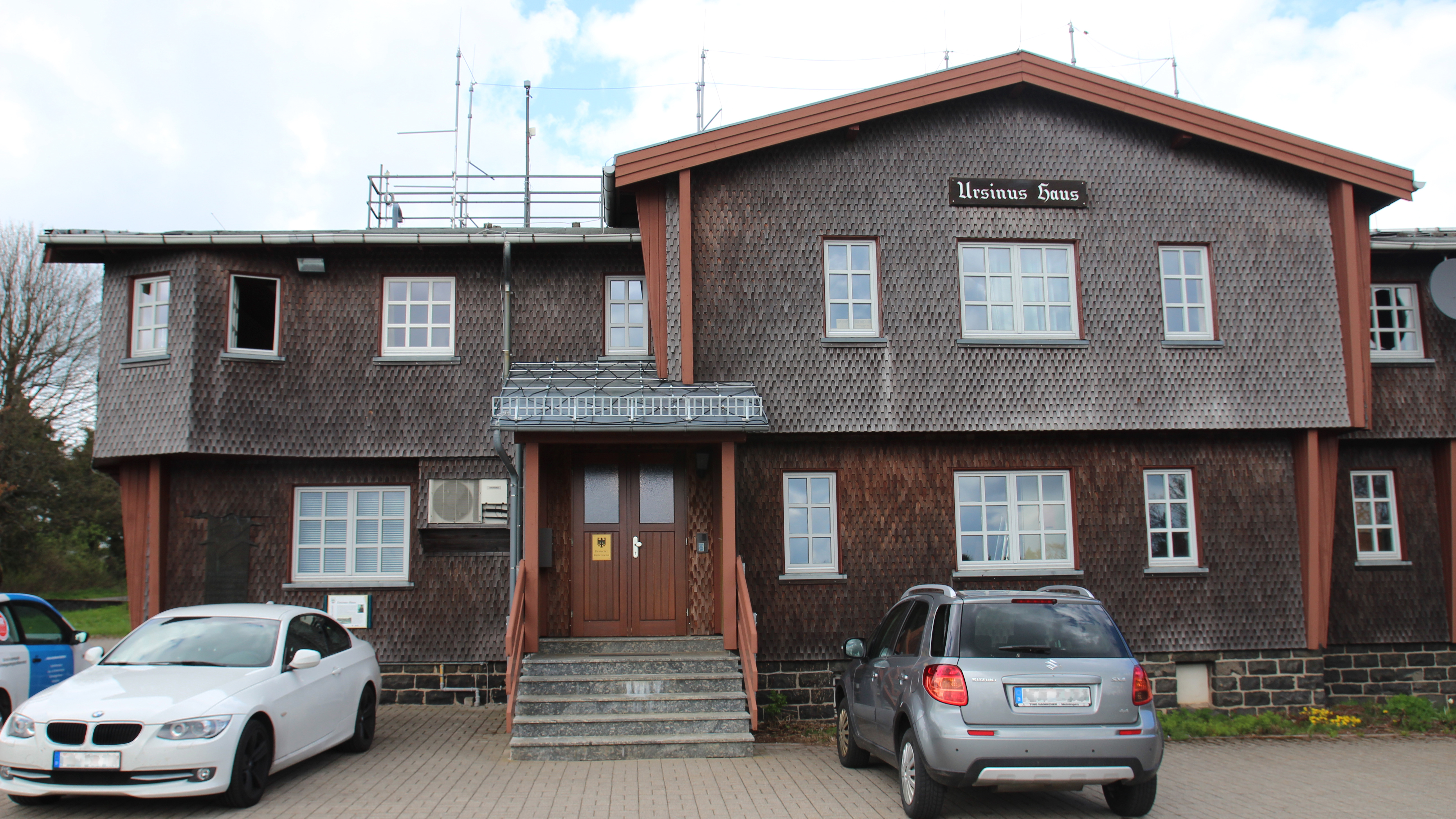 Das Ursinus-Haus auf der Wasserkuppe. Die Rhön-Rossitten-Gesellschaft (RRG) errichtete 1925 auf dem Fundament der Messerschmitt-Flugschule ein Gebäude, in dem die Abteilungen Flugtechnik und Aerodynamik des Forschungsinstituts der RRG, die Leitung und Organisation der Rhönwettbewerbe und eine Wetterwarte des Preußischen Meteorologischen Dienstes untergebracht wurden. Das Gebäude erhielt seinen Namen zu Ehren des Mitbegründers der Rhönsegelflugwettbewerbe, Oskar Ursinus.